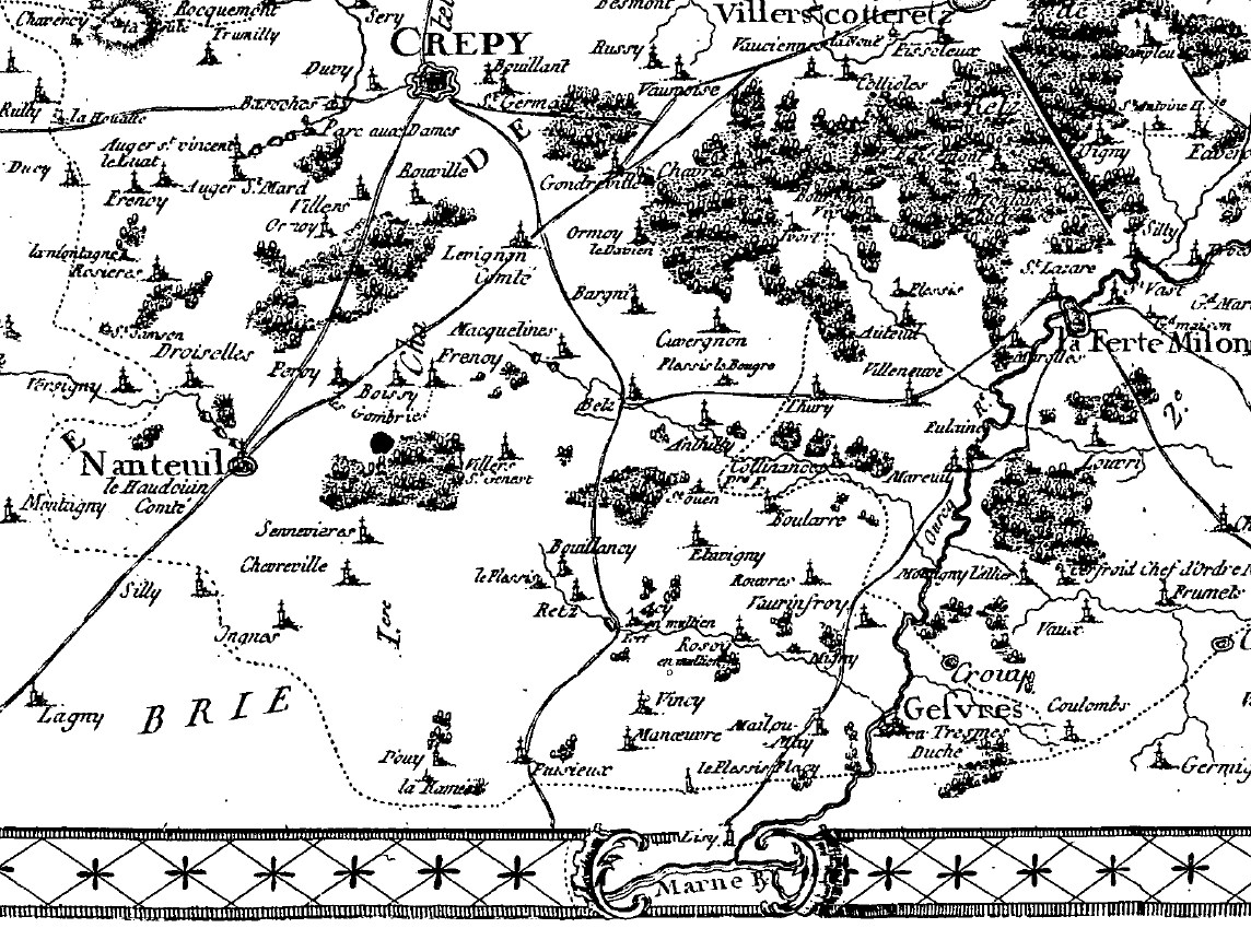 Limite sud du Valois ; extrait du plan du Valois